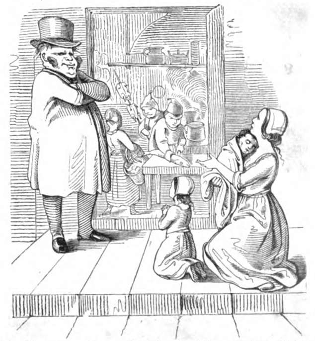 Fliegende Blätter, Volume 1, image on page 55